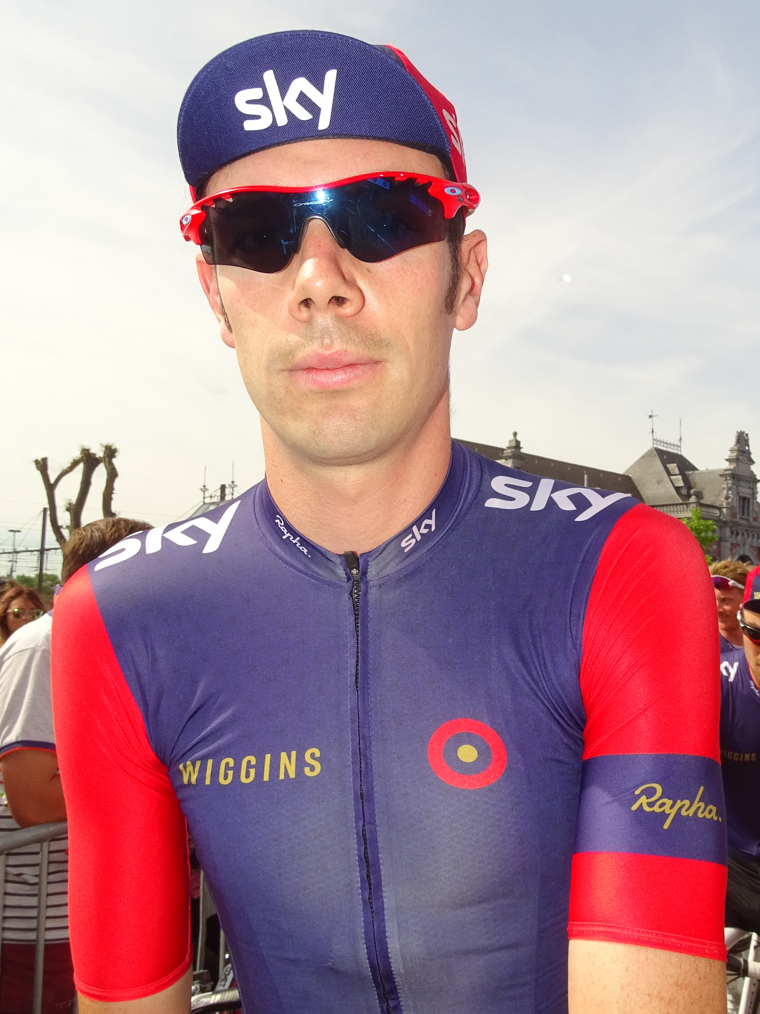 Reportage réalisé le mercredi 22 juillet à l'occasion du départ du Grand Prix Pino Cerami 2015 à Saint-Ghislain, Belgique.